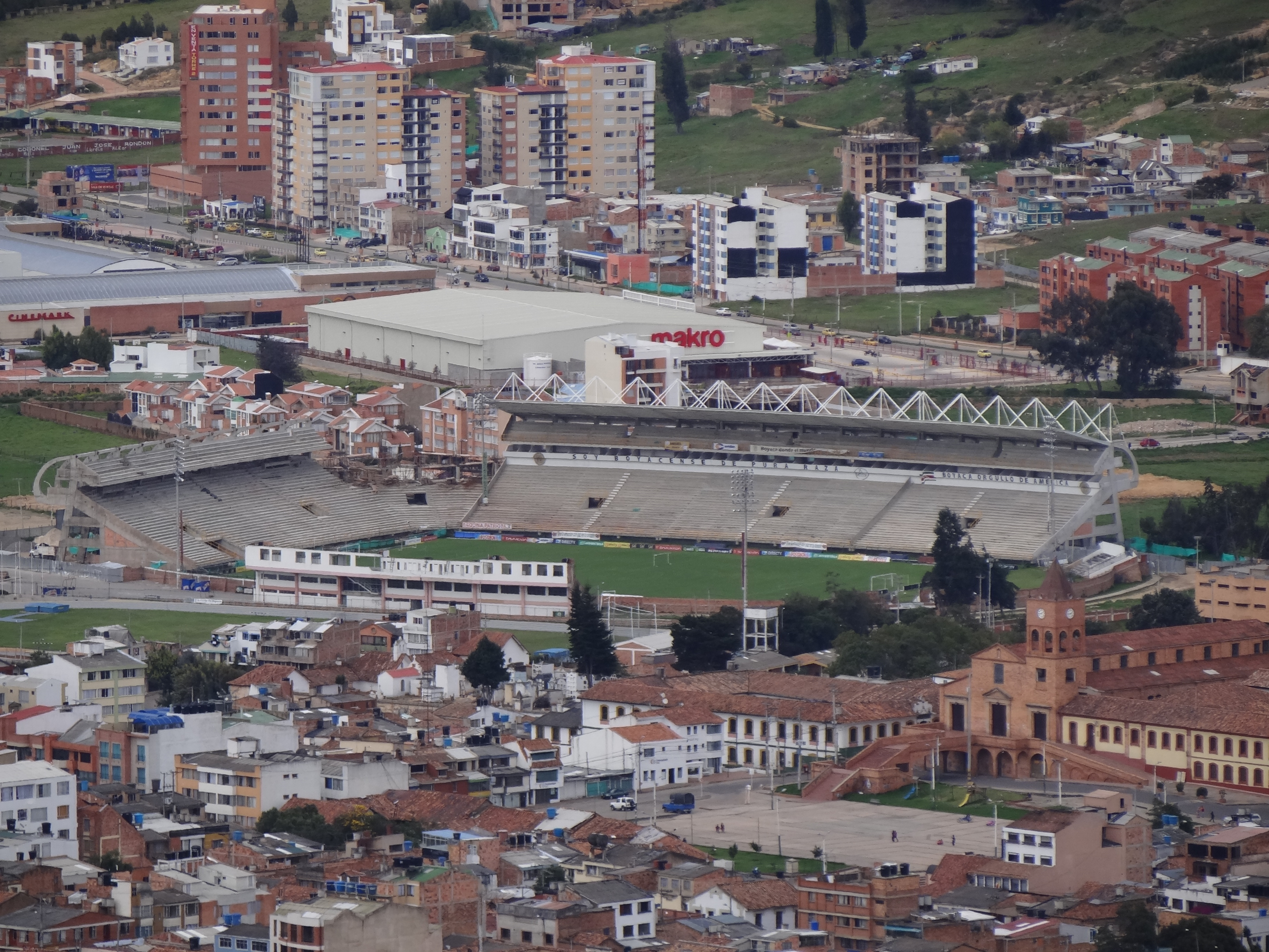 Estadio La Independencia, Tunja, Boyacá, Colombia, desde el cerro de San Lázaro